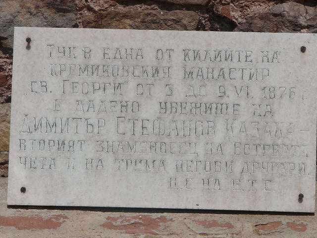 Паметна плоча на старата църква на Кремиковския манастир